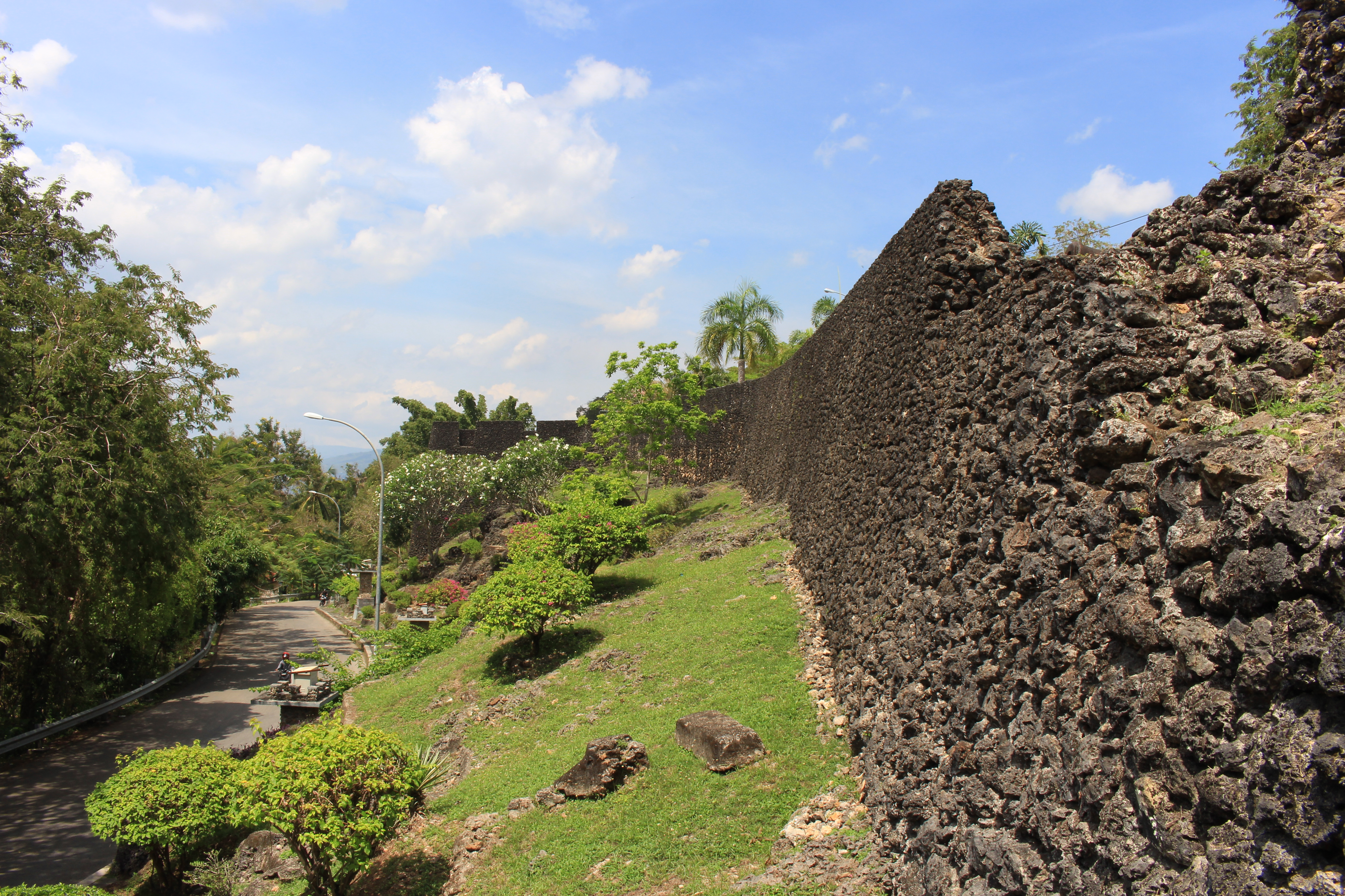 Tembok Benteng Keraton Buton bagian luar.